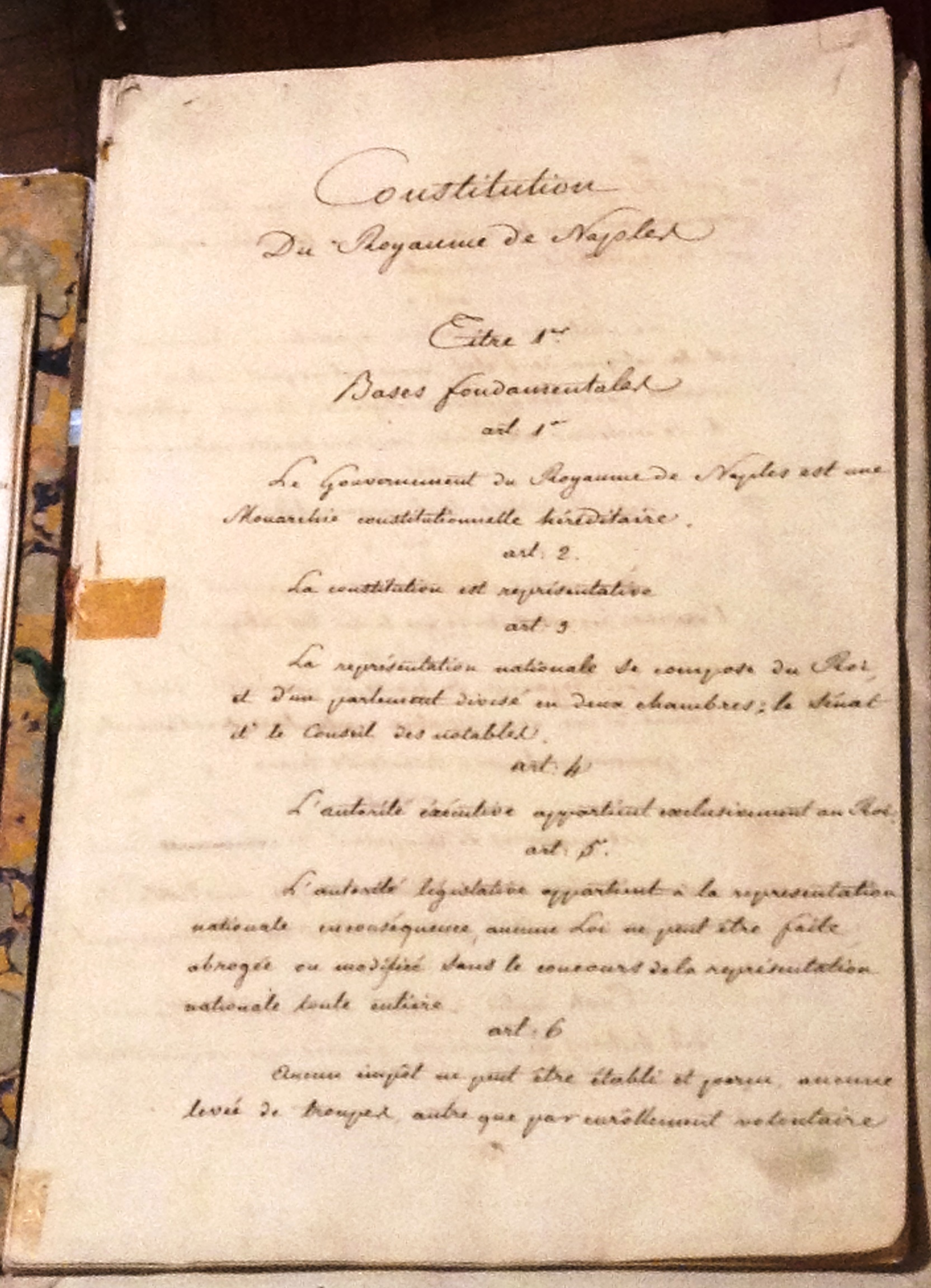 Exemplar mostrat a l'exhibició "Murat re di Napoli. A passo di carica", al Palau Reial de Nàpols